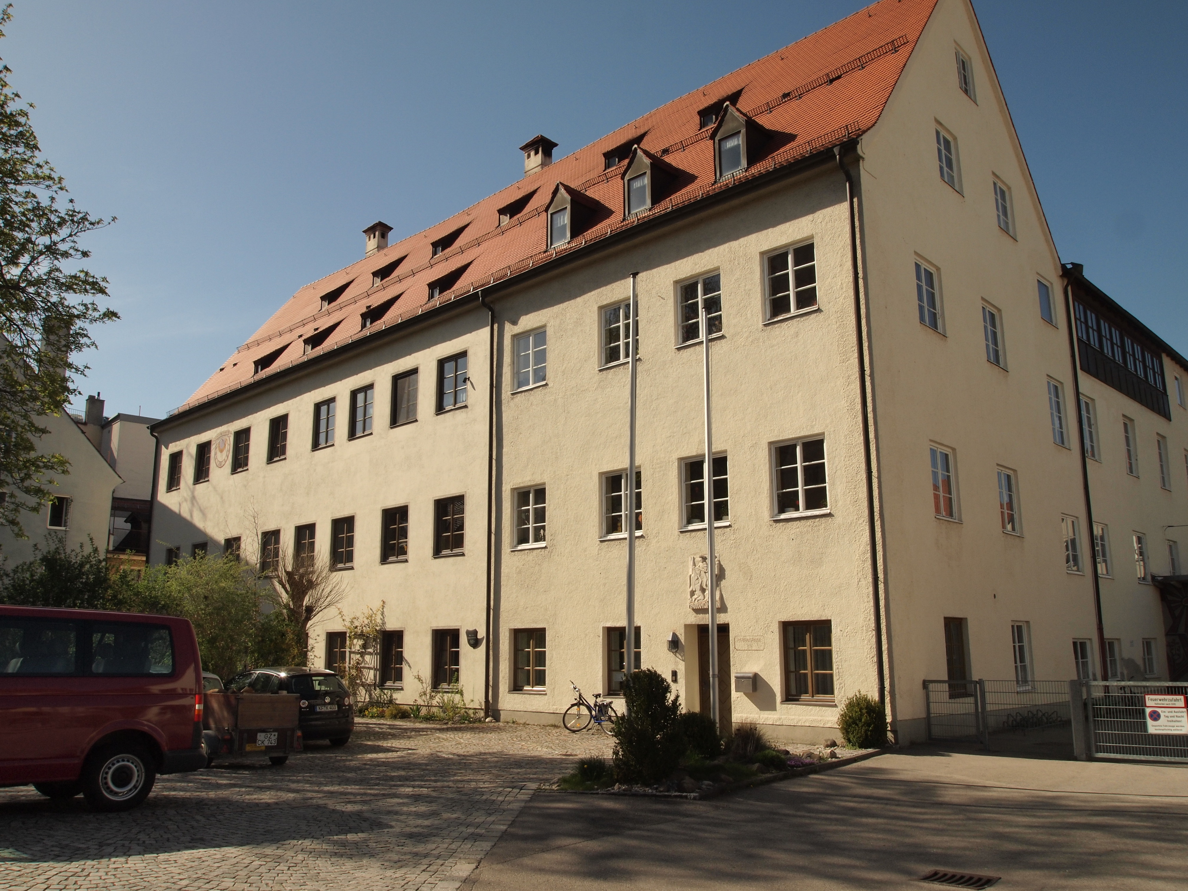 Ehem. Jesuitenkolleg